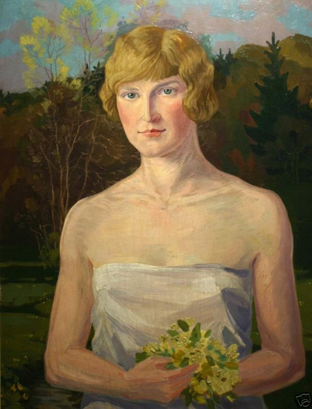 Figur - sitzende Frau